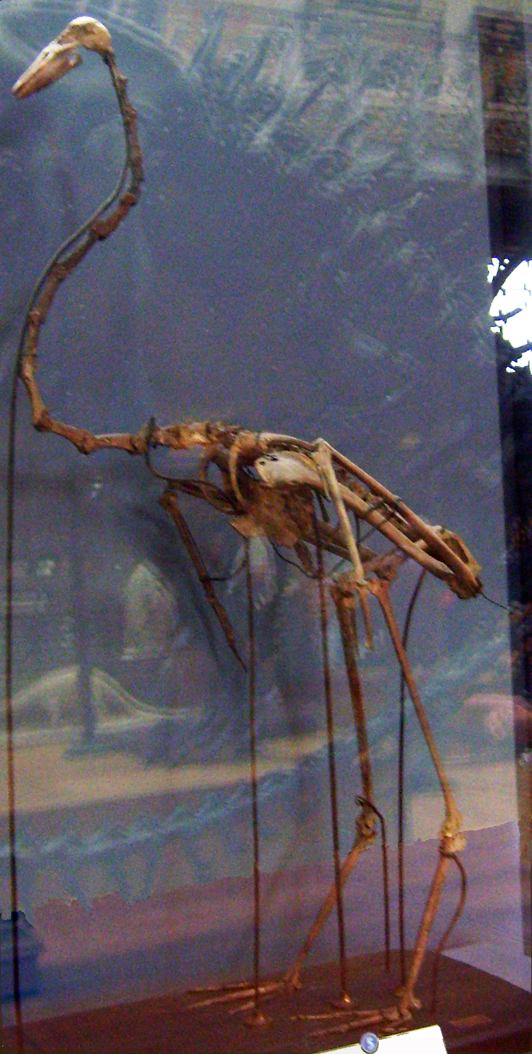 Palaelodus ambiguus skeleton, Muséum national d'histoire naturelle, Paris.